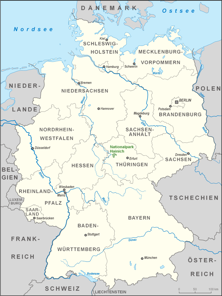 Karte des Nationalparks Hainich in Deutschland